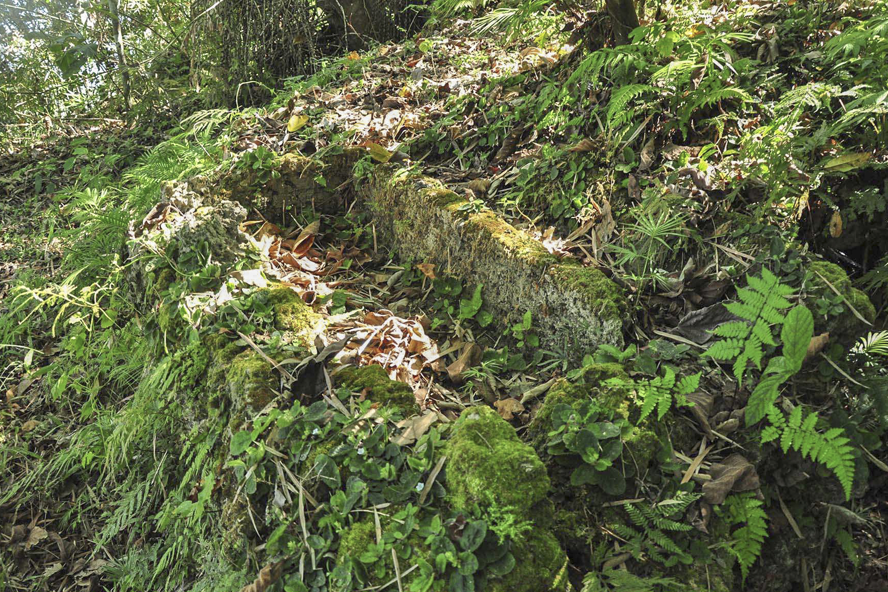 Tumbas caliza de Khamantik (Filipinas)